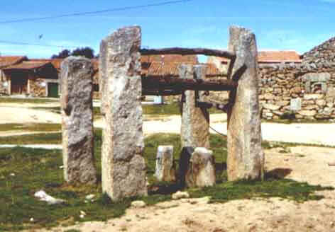 Potro para herrar vacas, burro, caballos... situado en el Egido